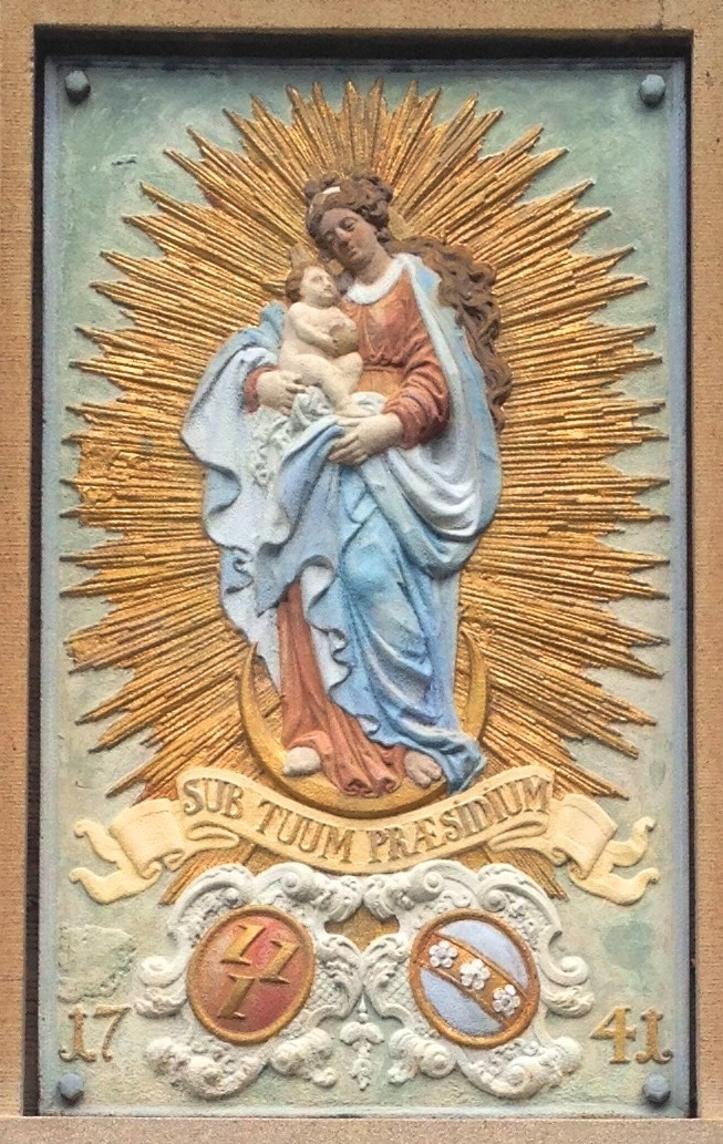 Mondsichelmadonna mit Schriftzug "SUB TUUM PRAESIDIUM", Jahreszahl 1741 und den Wappen der Familien von Brabeck und von Kerckerinck in Liebenburg-Kunigunde, Eisengussrelief, koloriert, identisch an den Brabeckschen Betrieben in Olpe-Stachelau